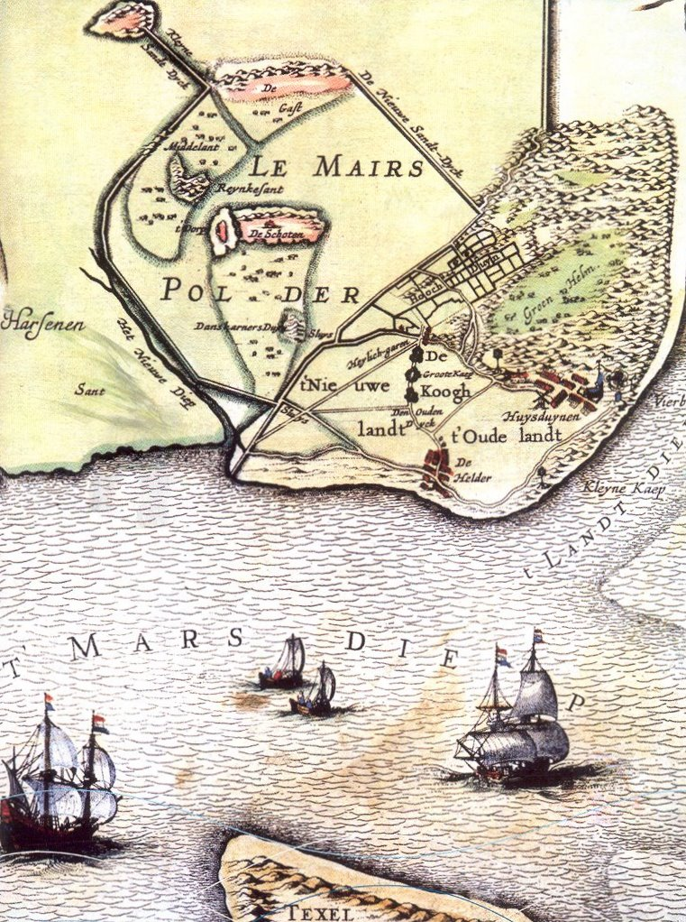 Kaerte van alle de Sanden, Gorsingen, Slicken, Waerden ende Kreecken, gelegen tusschen Huysduynen, Wieringen, Wieringerwaerdt, Zyp ende Kalands-Ooge, genaemt het Koegras, in dewelcke d'Erfgenamen van Sal. Isaac le Maire, als eygenaers van de gronden gelegen onder 't resort van Huysduynen van meininge zijn (volgens haer Octroy) uyt te geven ende te bedijcken De Polder van Le Maire, alhier afgebeelt. Getekend op een schaal van 1000 Rijnlandse Roeden.